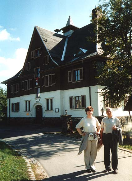 Jugendherberge "Paul Mothes" in 08349 Johanngeorgenstadt, Hospitalstraße 5